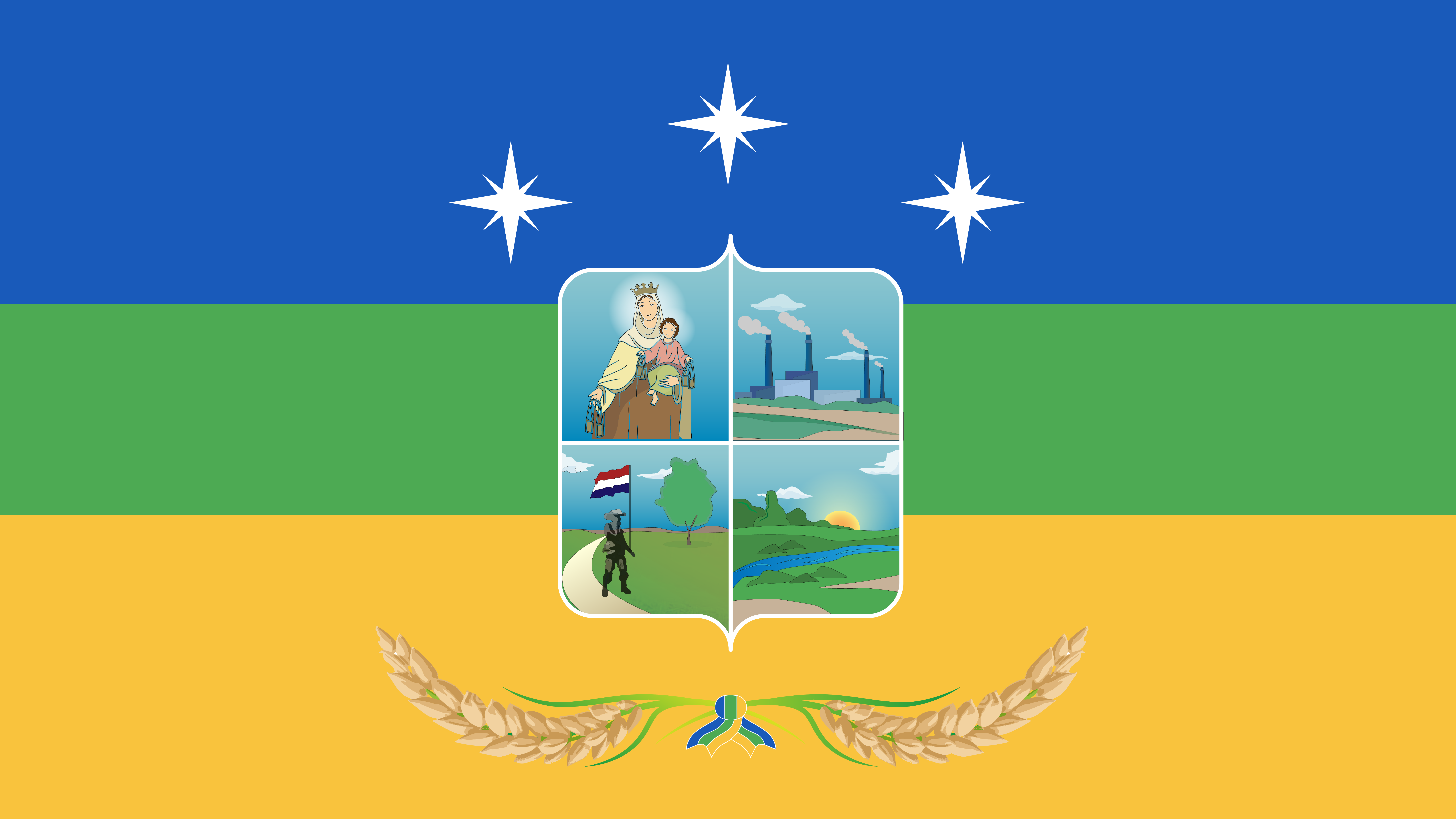 Bandera